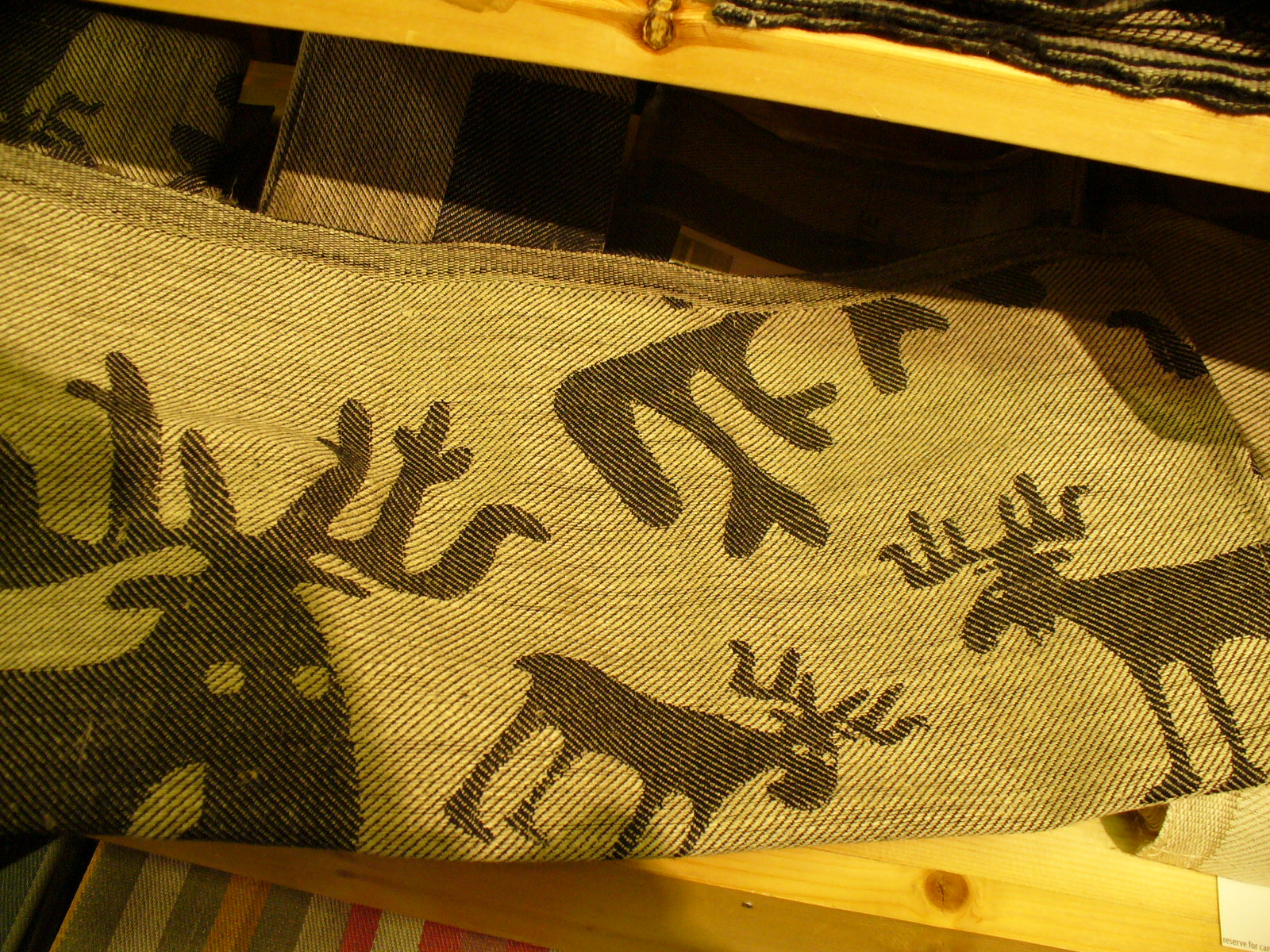 Egy rénszarvas mintás textília szaunázáshoz, Finnország